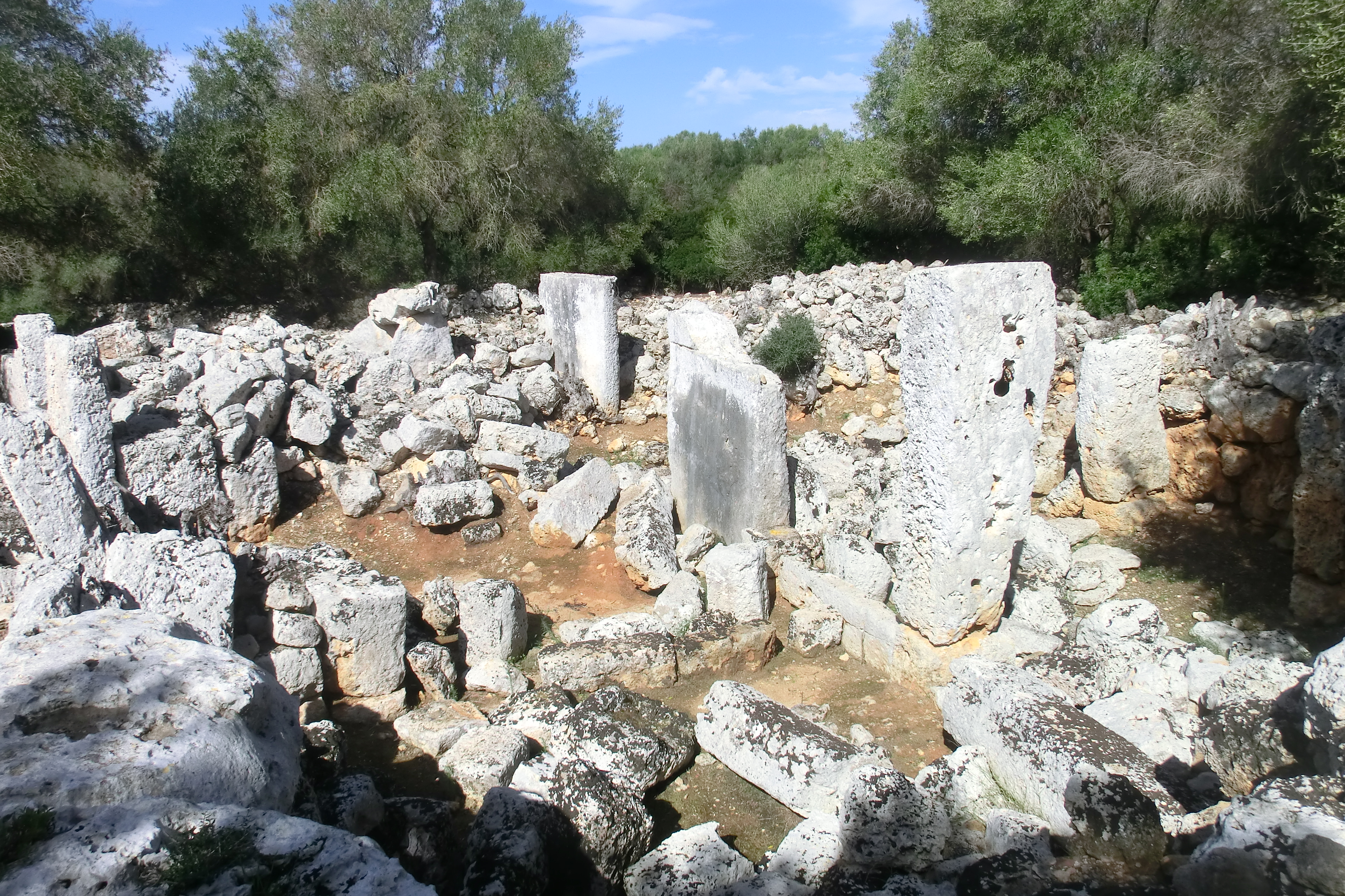 Blick in das Taula-Heiligtum der prähistorischen Siedlung von Son Catlar, Menorca